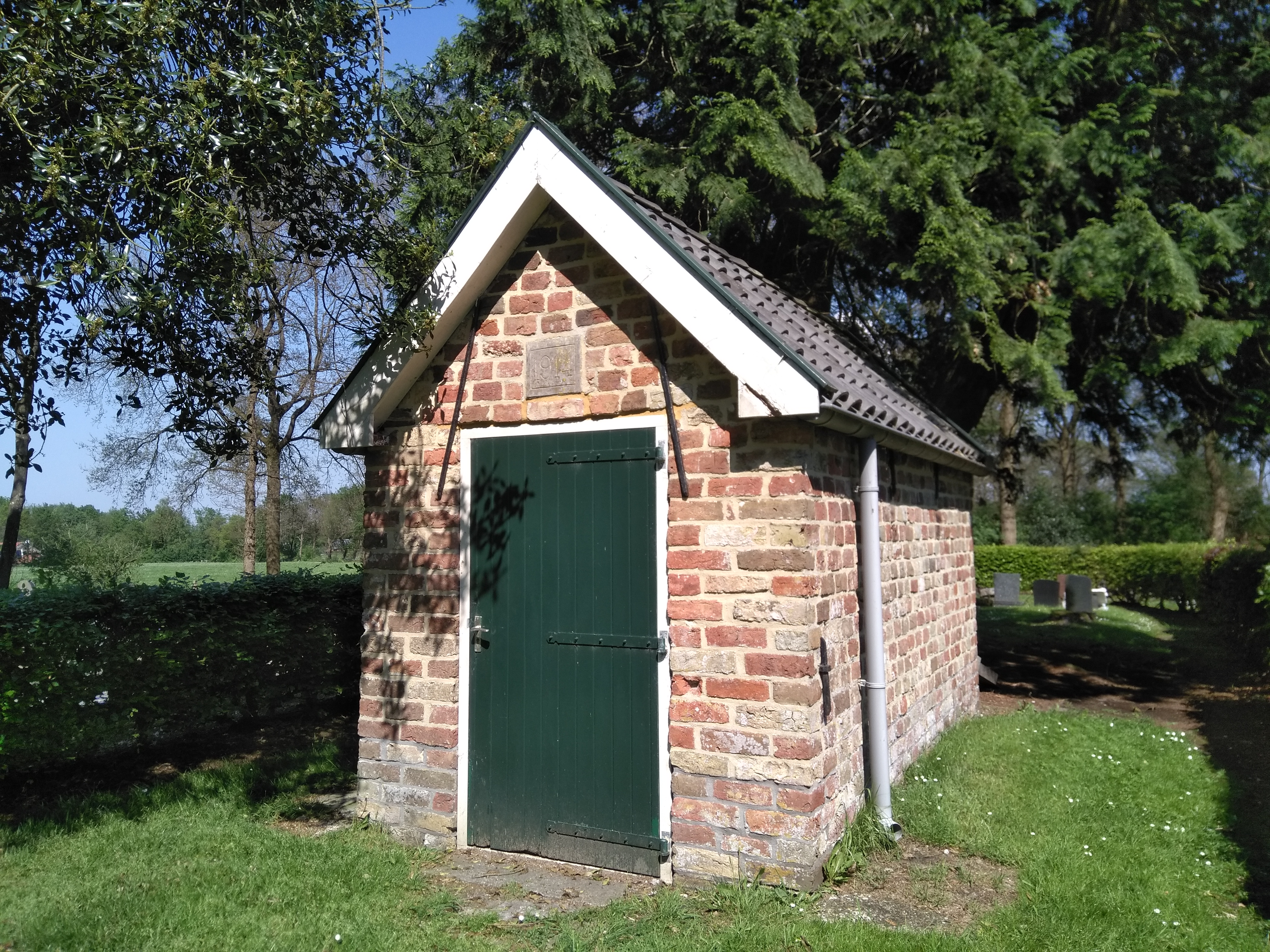 Baarhuisje op het kerkhof van Siegerswoude, Opsterland, Friesland.